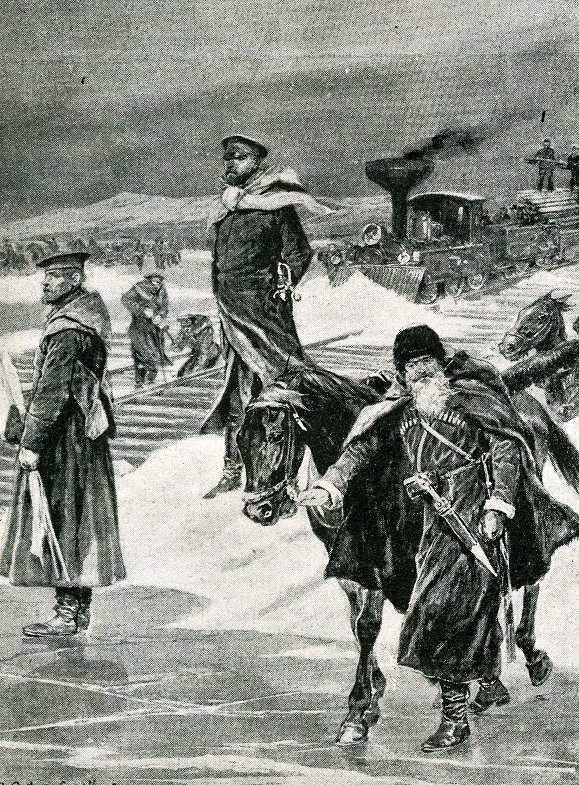 Le transport des troupes russes en Asie